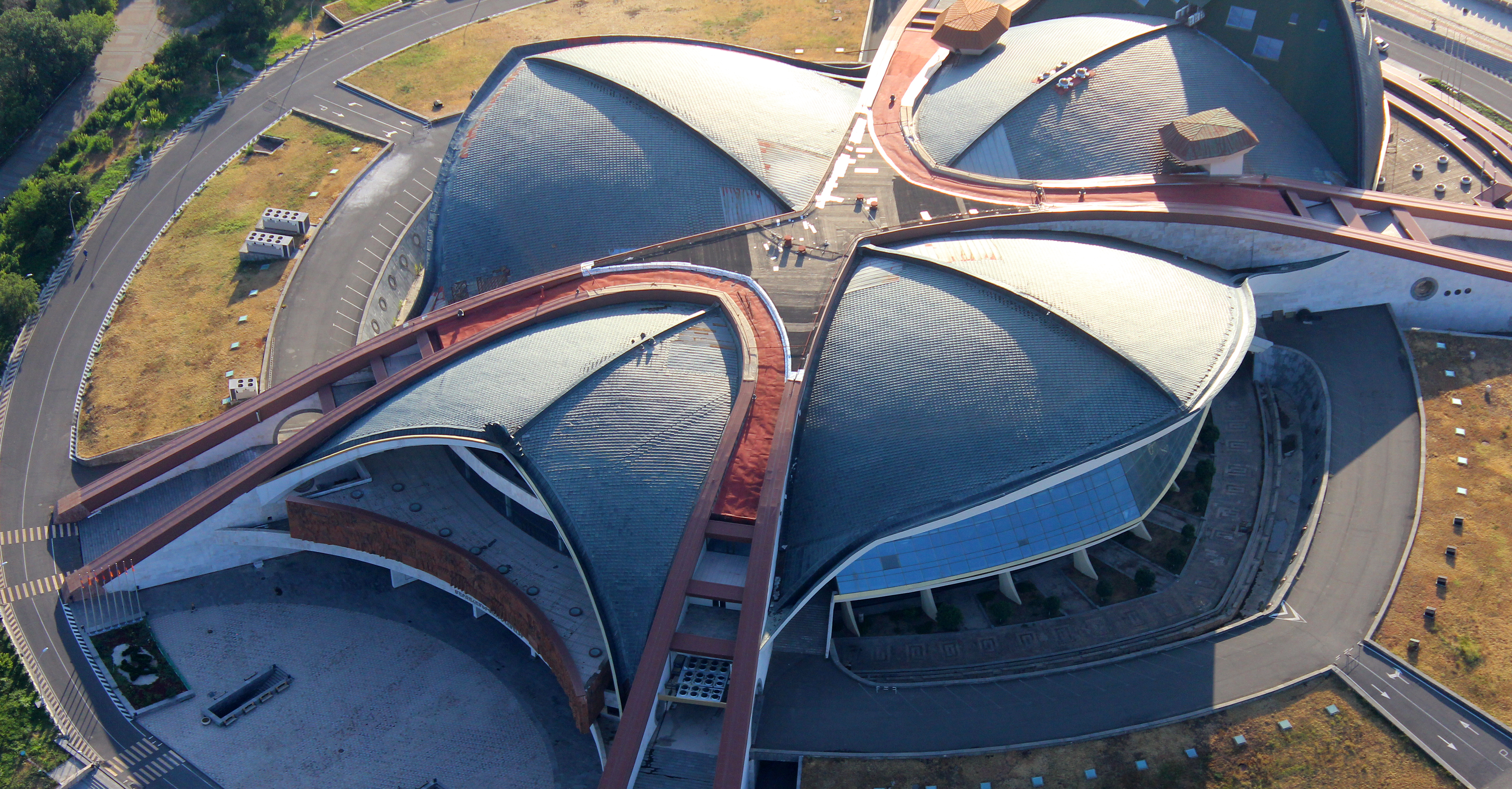 Երևանի մարզահամերգային համալիրը թռչնի բարձրությունից 6/148